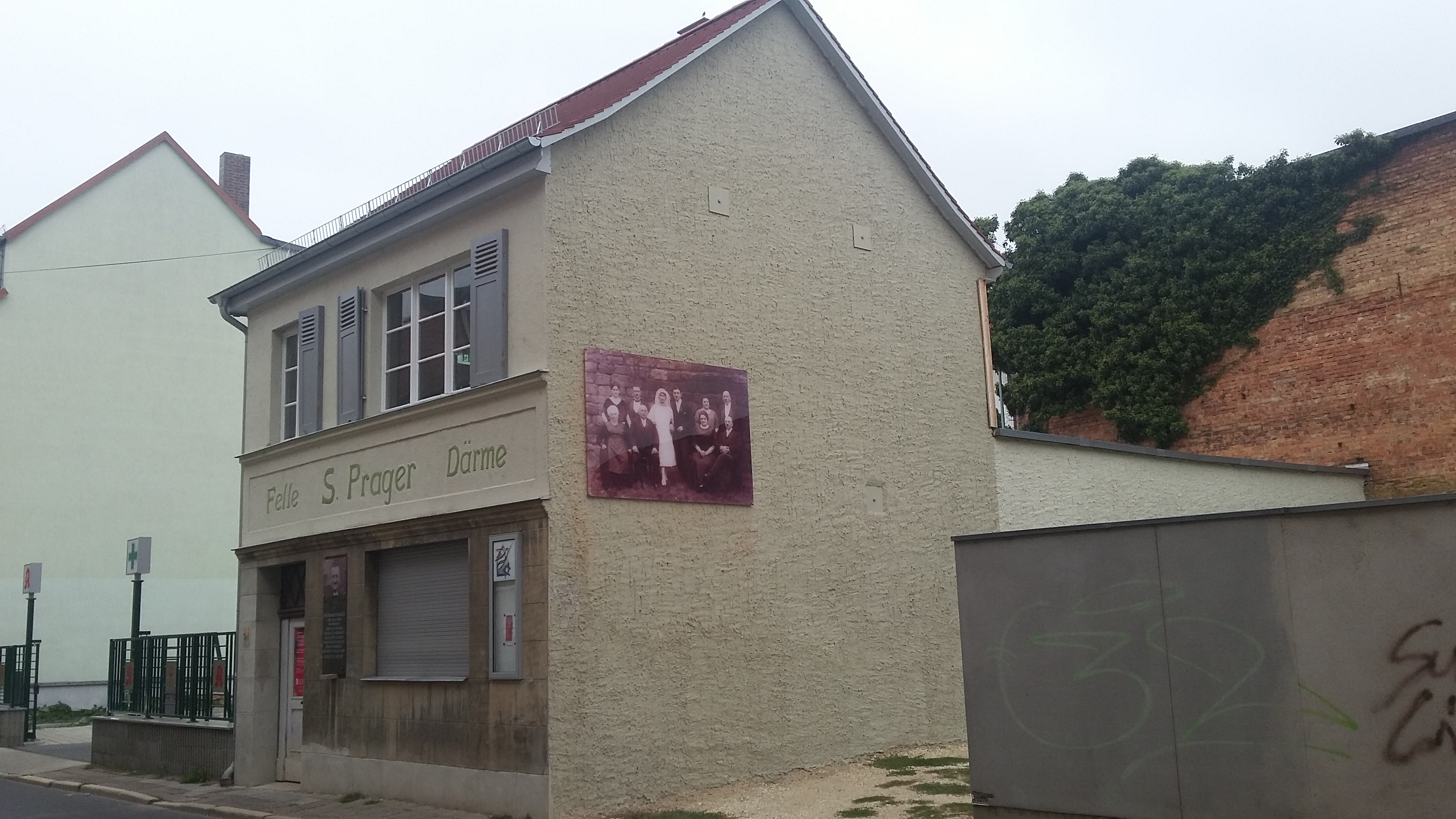 Das weitgehend restaurierte Prager-Haus Apolda aus südwestlicher Blickrichtung